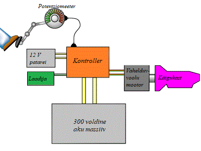 Vahelduvvoolu kontroller haakub vahelduvvoolumootoriga.